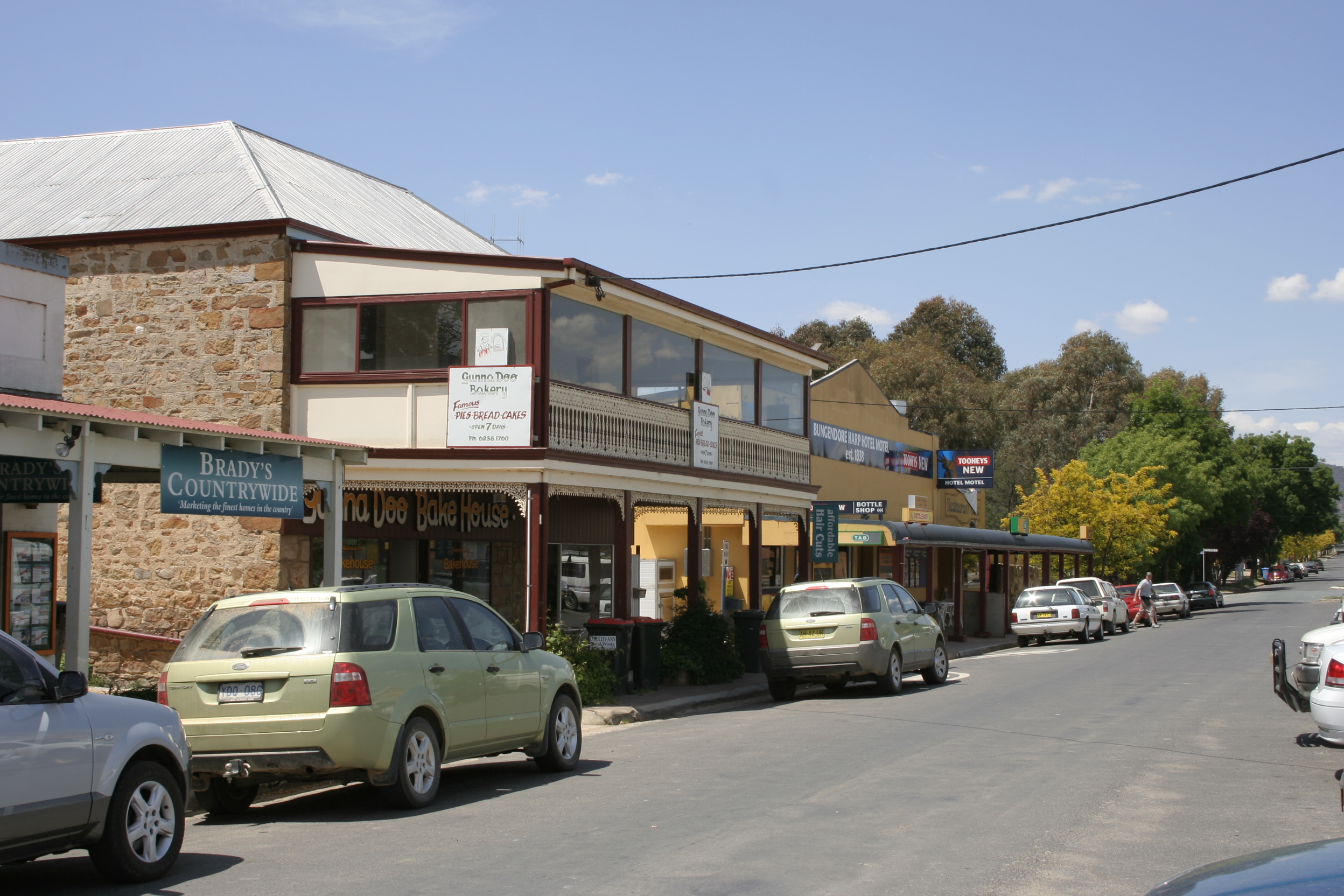 Bungendore, Gibraltar Street